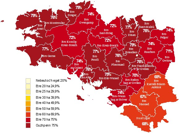 Dregantad a dud a-du da gaout muioc'h a vrezhoneg er skolioù